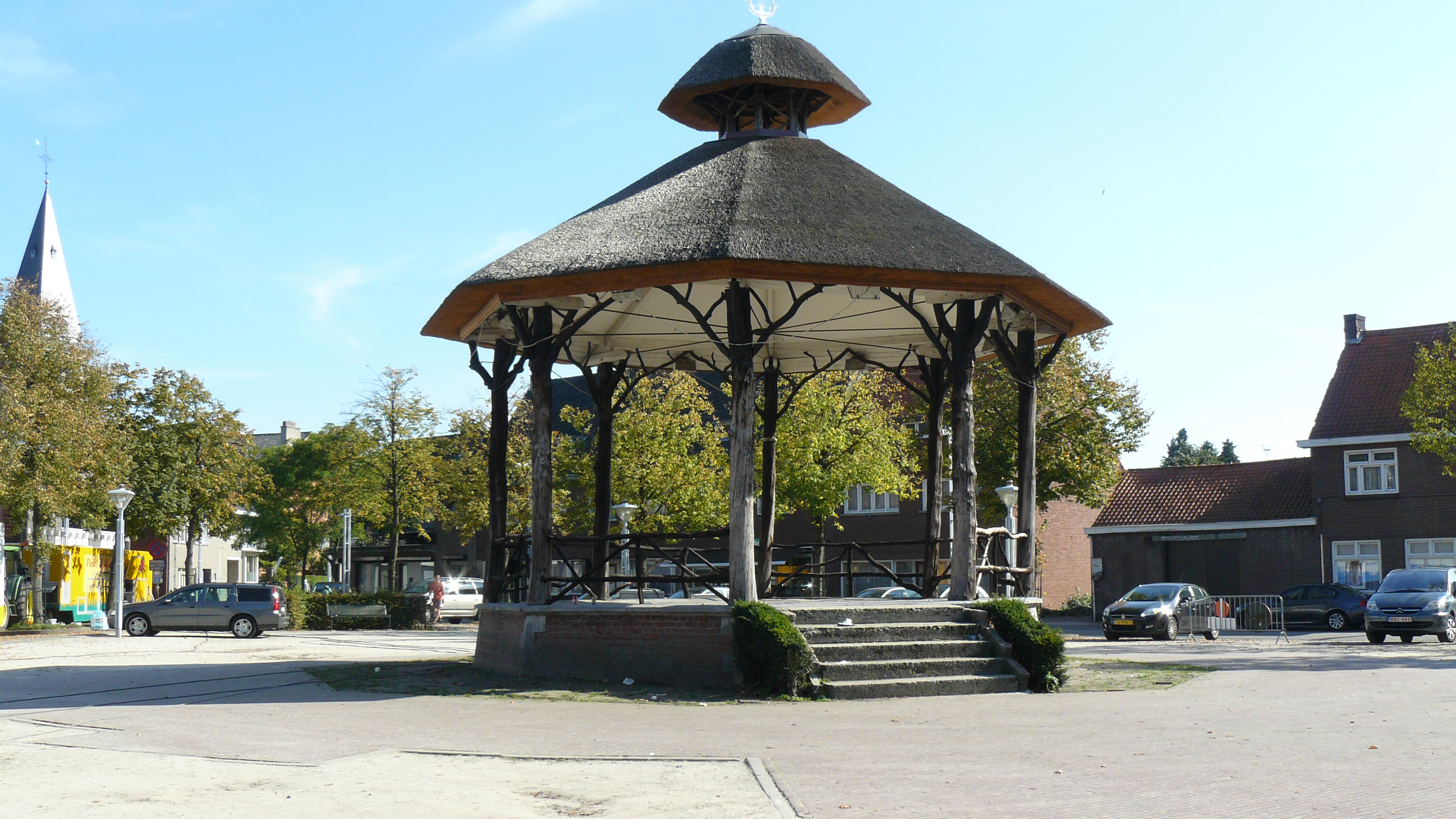 kiosk overpelt